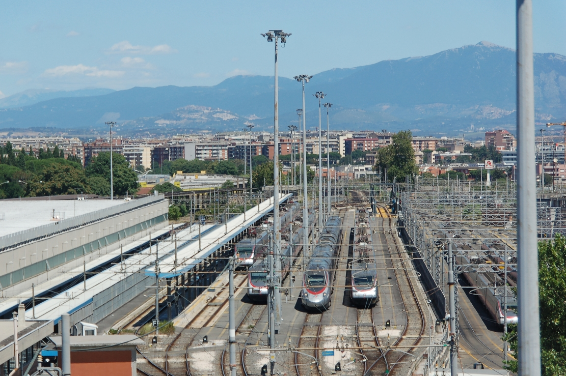 Roma, stazione Tiburtina